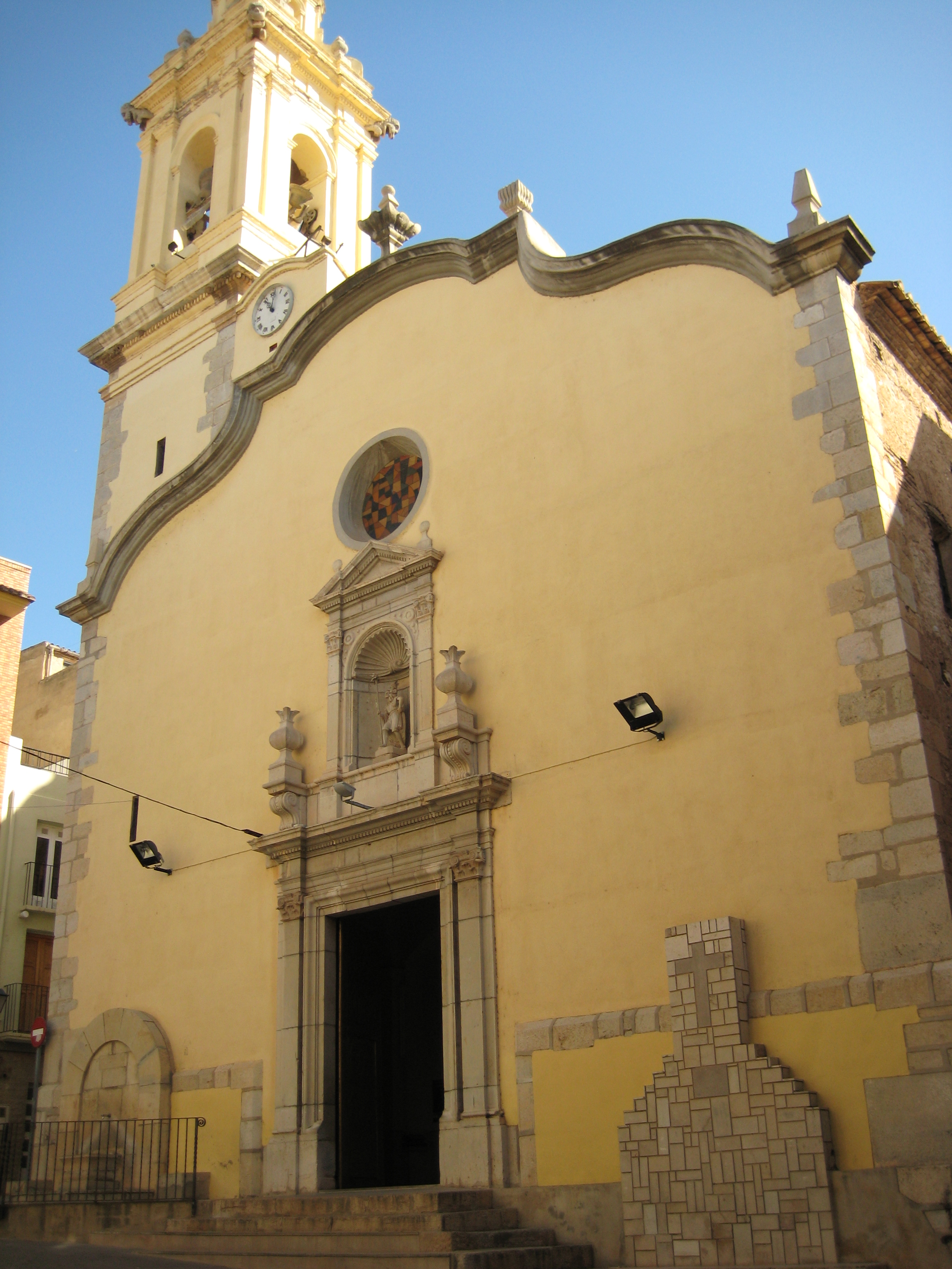 Façana principal de l'església de Sant Cristòfol de Ribesalbes (Plana Baixa)